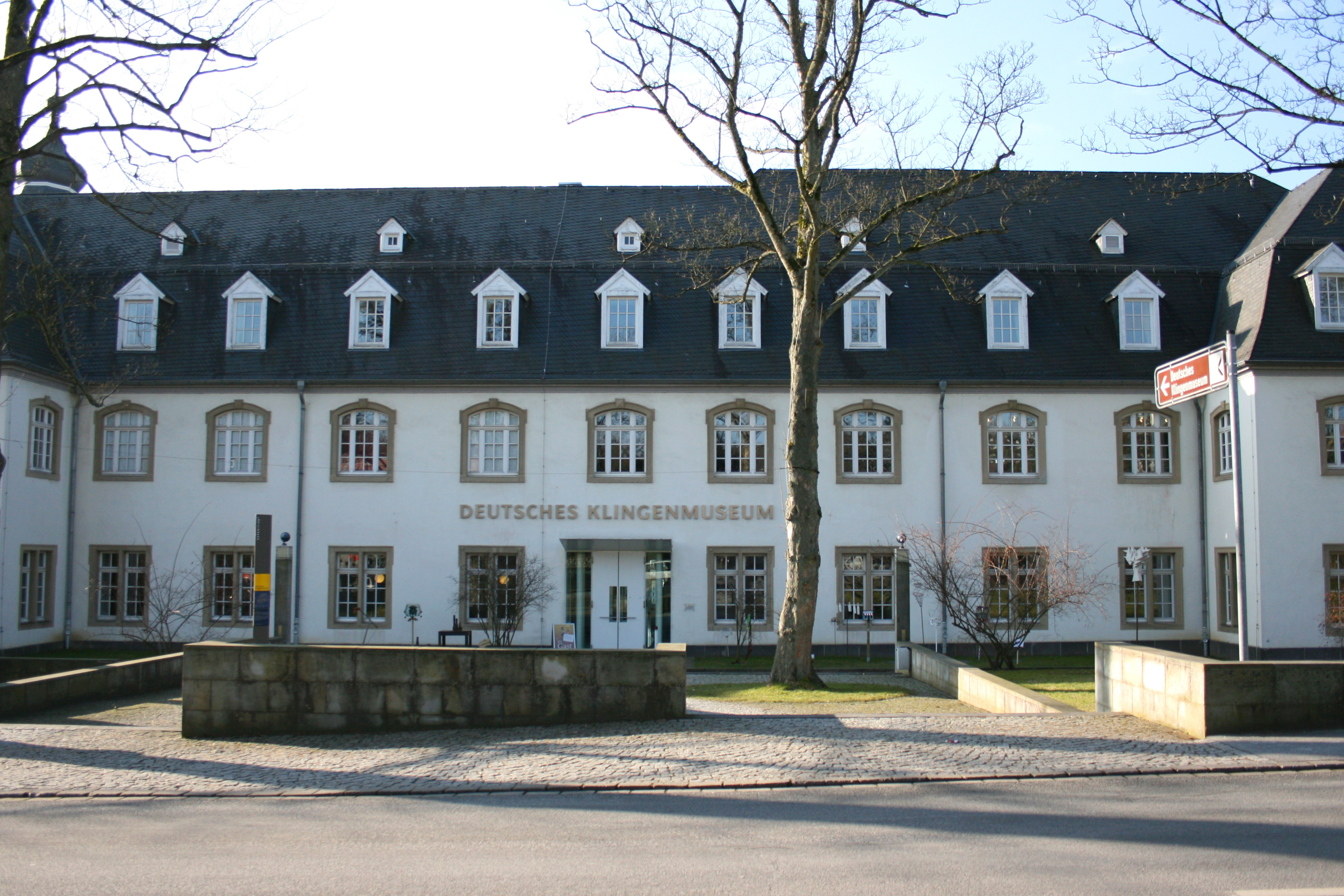 Deutsches Klingenmuseum in Solingen